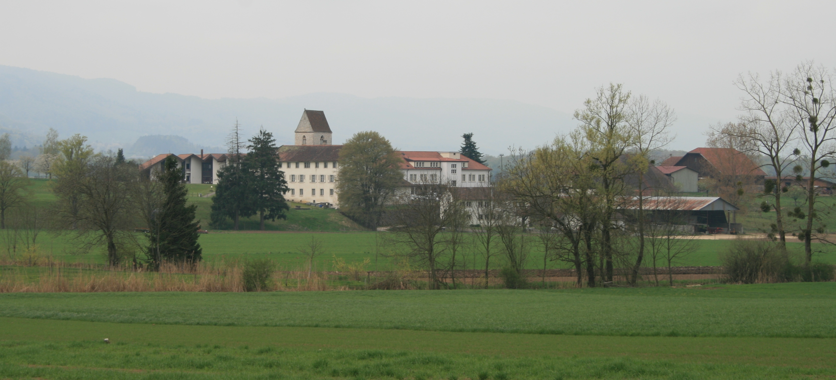 Miserez, La Baroche JU, Schweiz